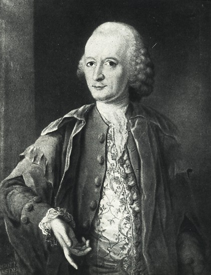 Der Göttinger Mathematiker Abraham Gotthelf Kästner.